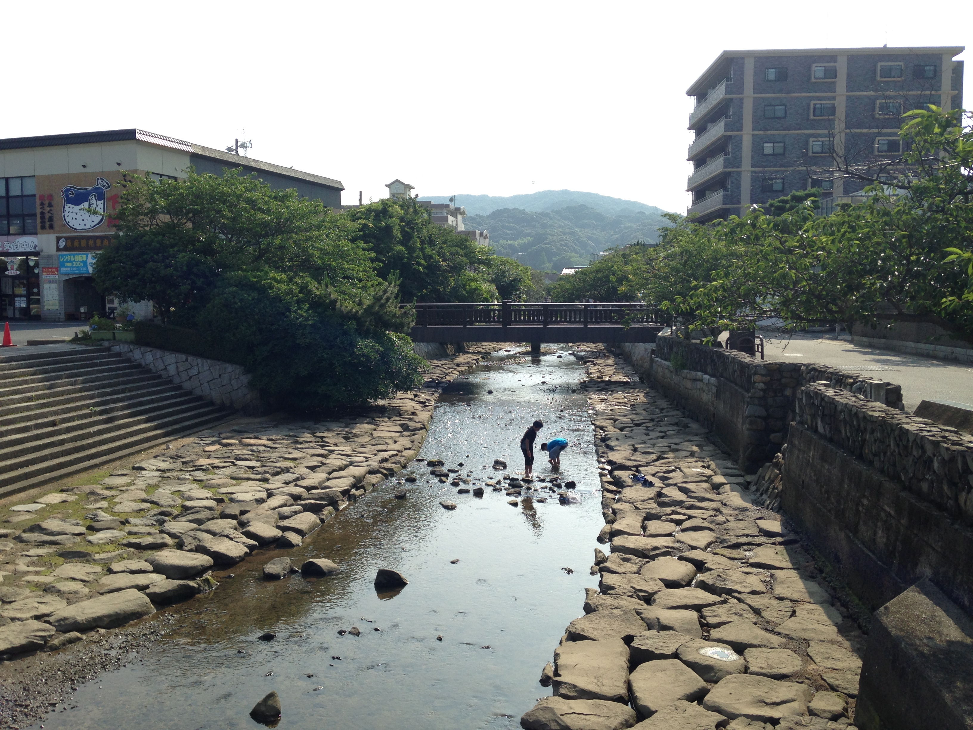 城下町長府・古都之浦橋より望む壇具川(上流側)と霊鷲山